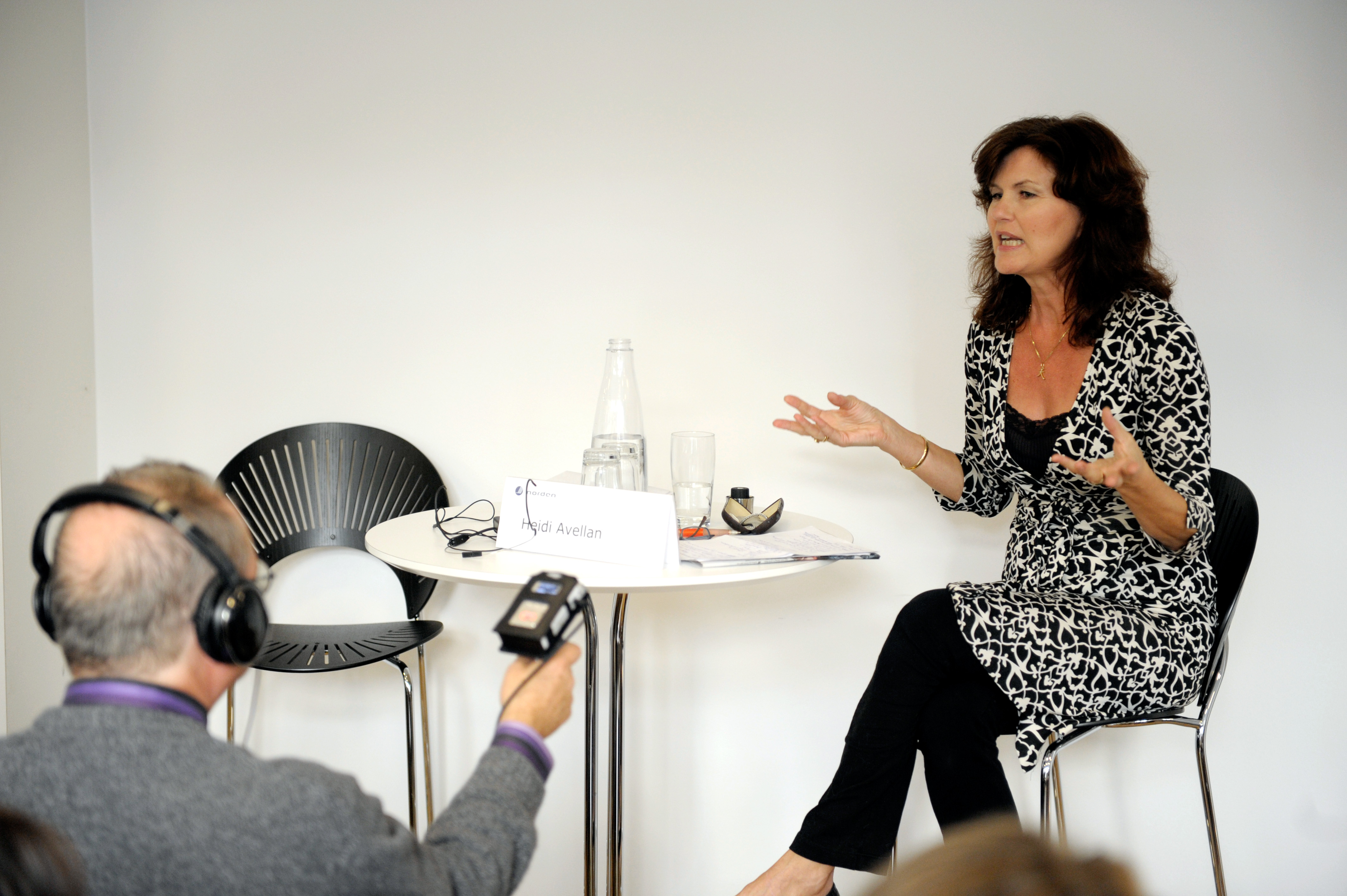 Heidi Avellan på Norden i fokus seminariet om det svenska valet 2010